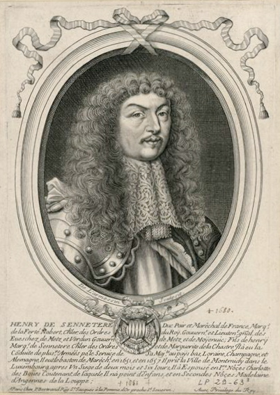 Henri, marquis de La Ferté-Seneterre (1600-1681) (Sennecterre ou Senneterre), Maréchal de France